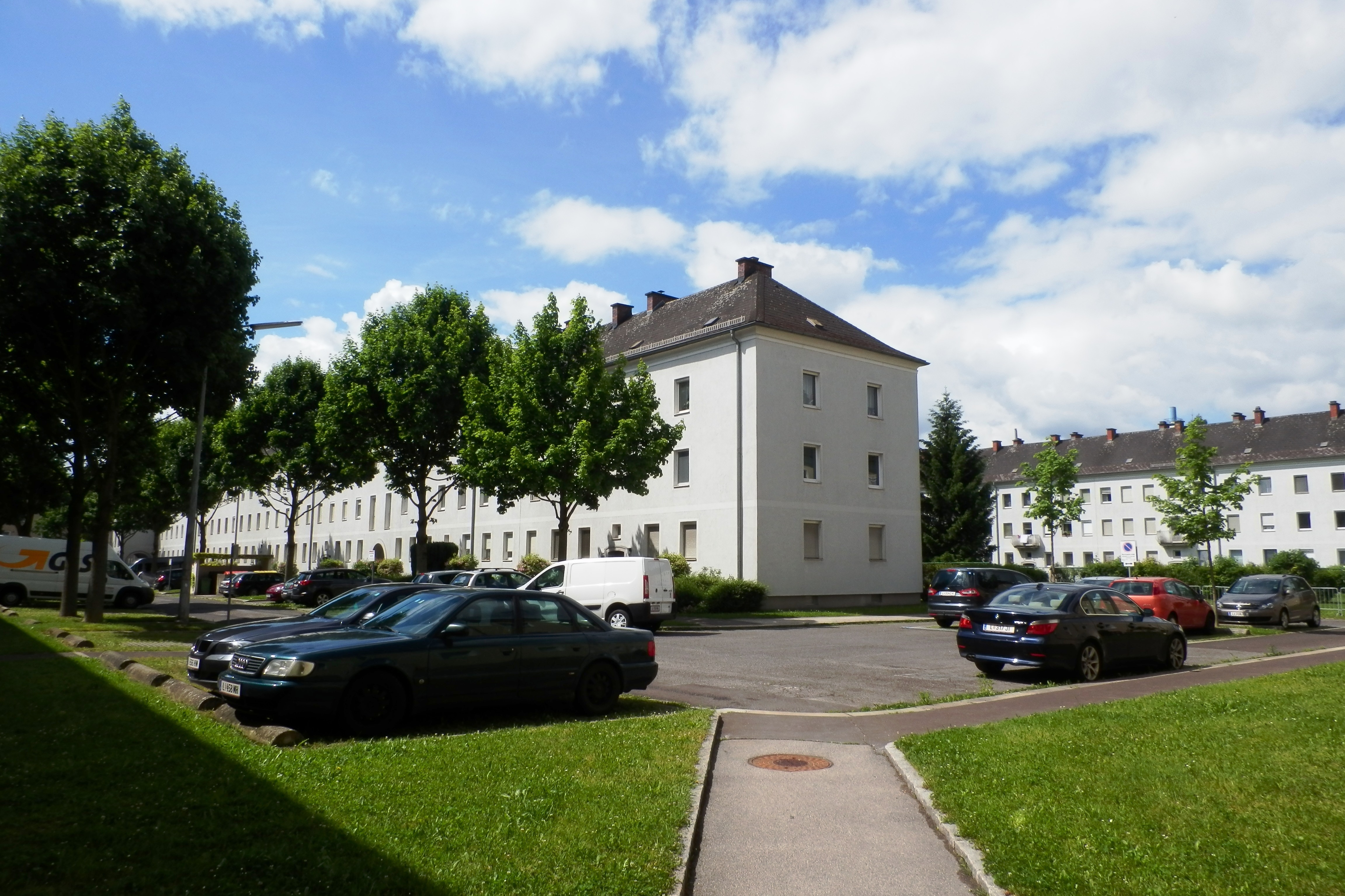 Bindermichlsiedlung - Seiseneggergang